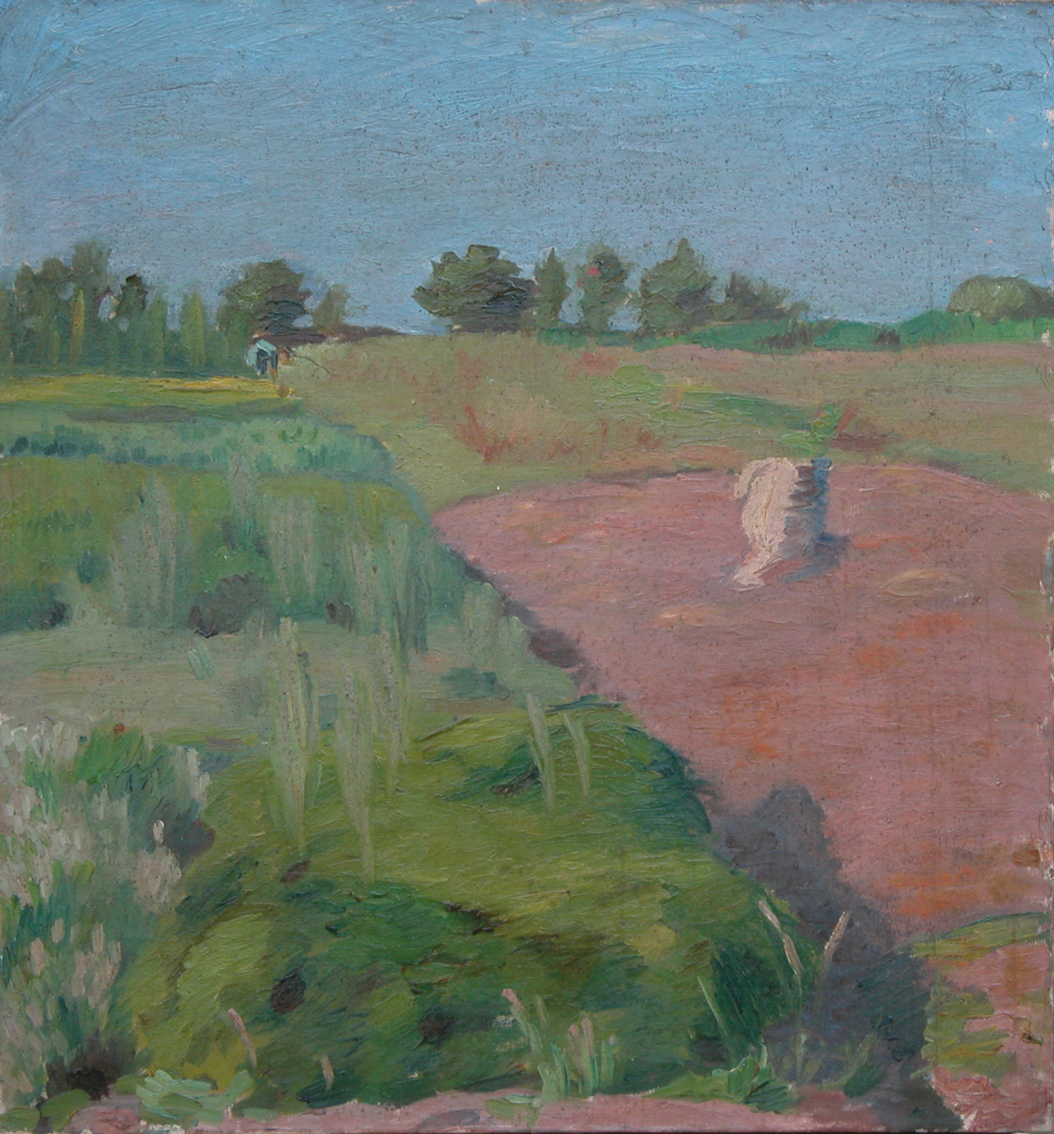 Carl Lohse-Der verlassene Sack